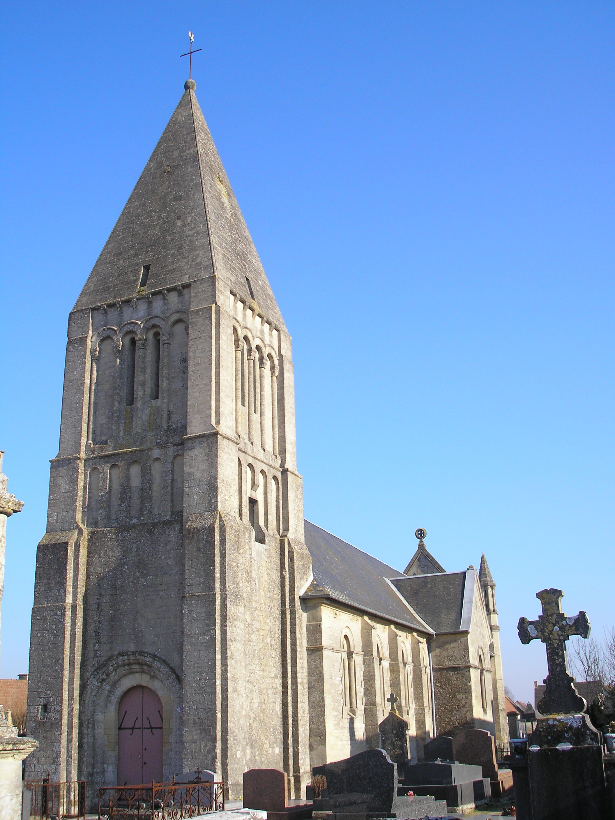 Basly (Normandie, France). L'église Saint-Georges dont le clocher est inscrit (ISMH, 18/03/1927).